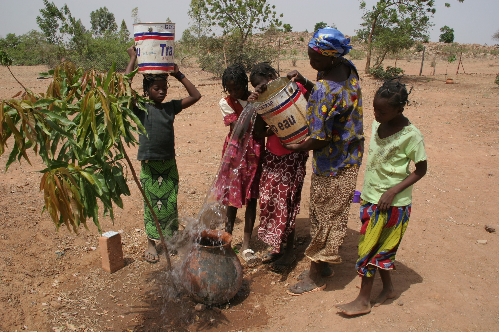 Gando mango tree project